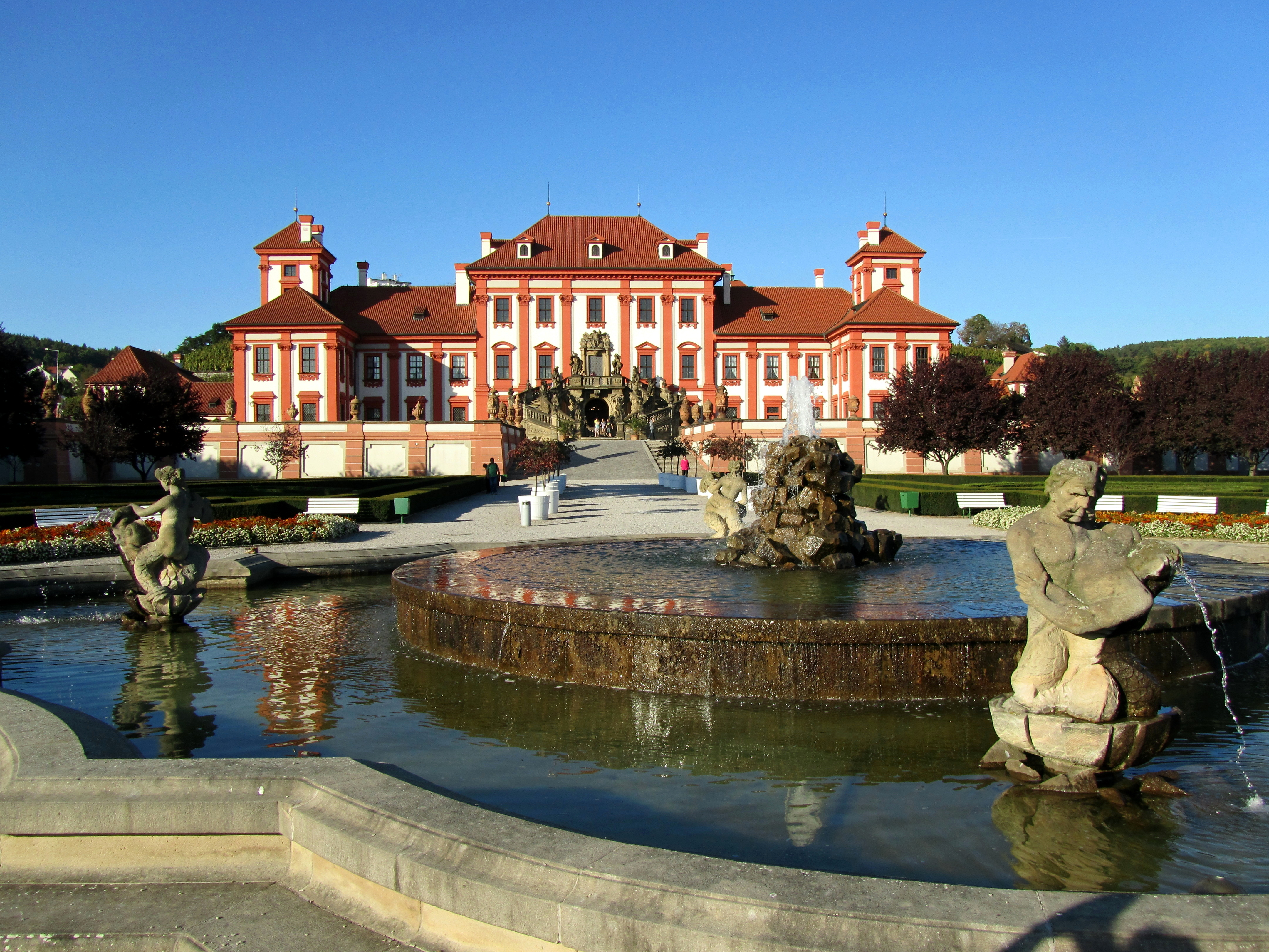 Trojský zámek, Troja, U Trojského zámku, Trojská, Povltavská 1/4